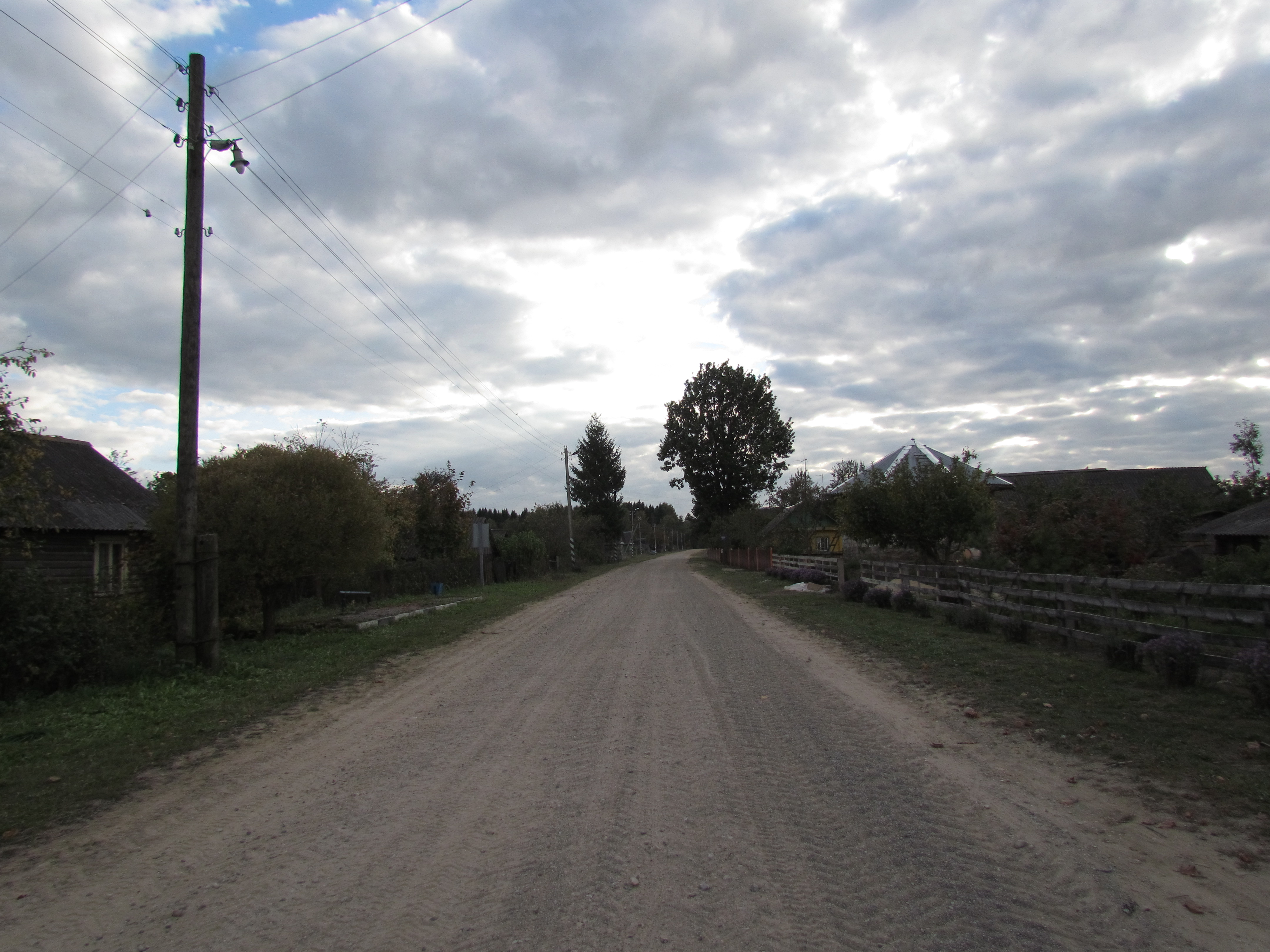 Беларуская (тарашкевіца): Вёска Выгар